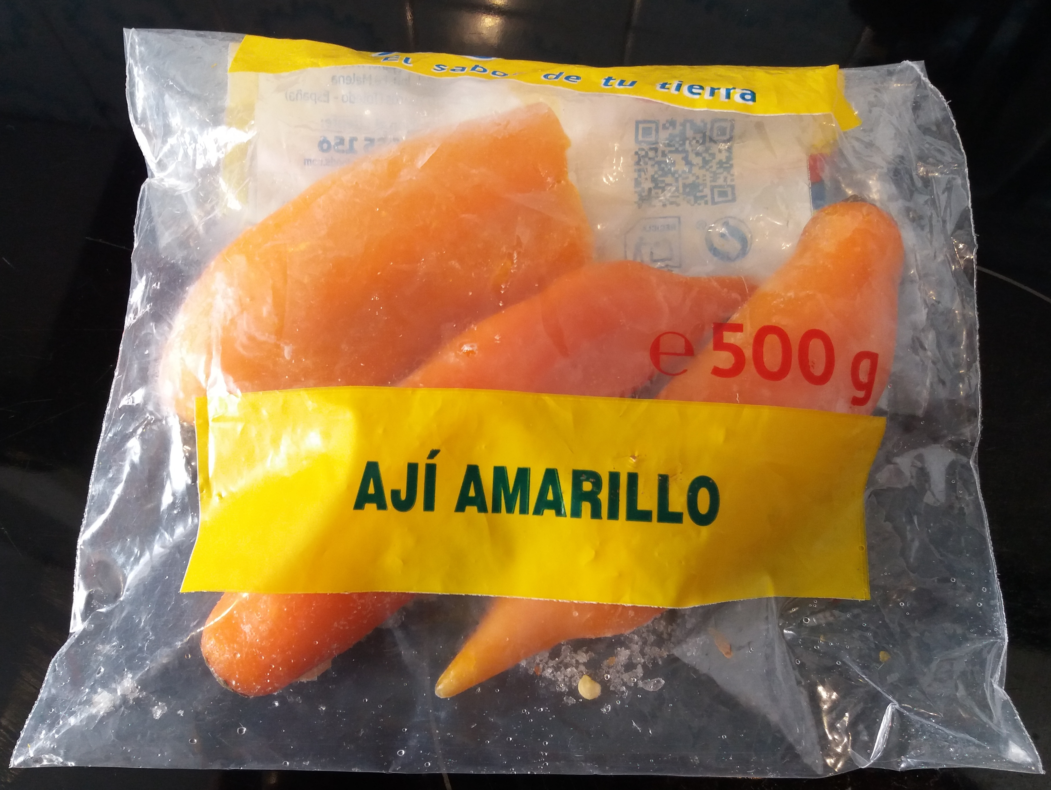 Aji amarillo